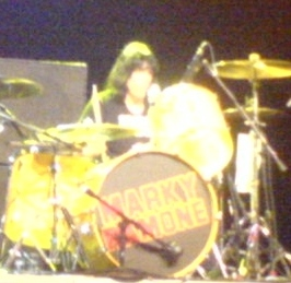 Foto que tirei do Marky Ramone tocando na Ramonesfest em 2006, comemorando 30 anos de Ramones.